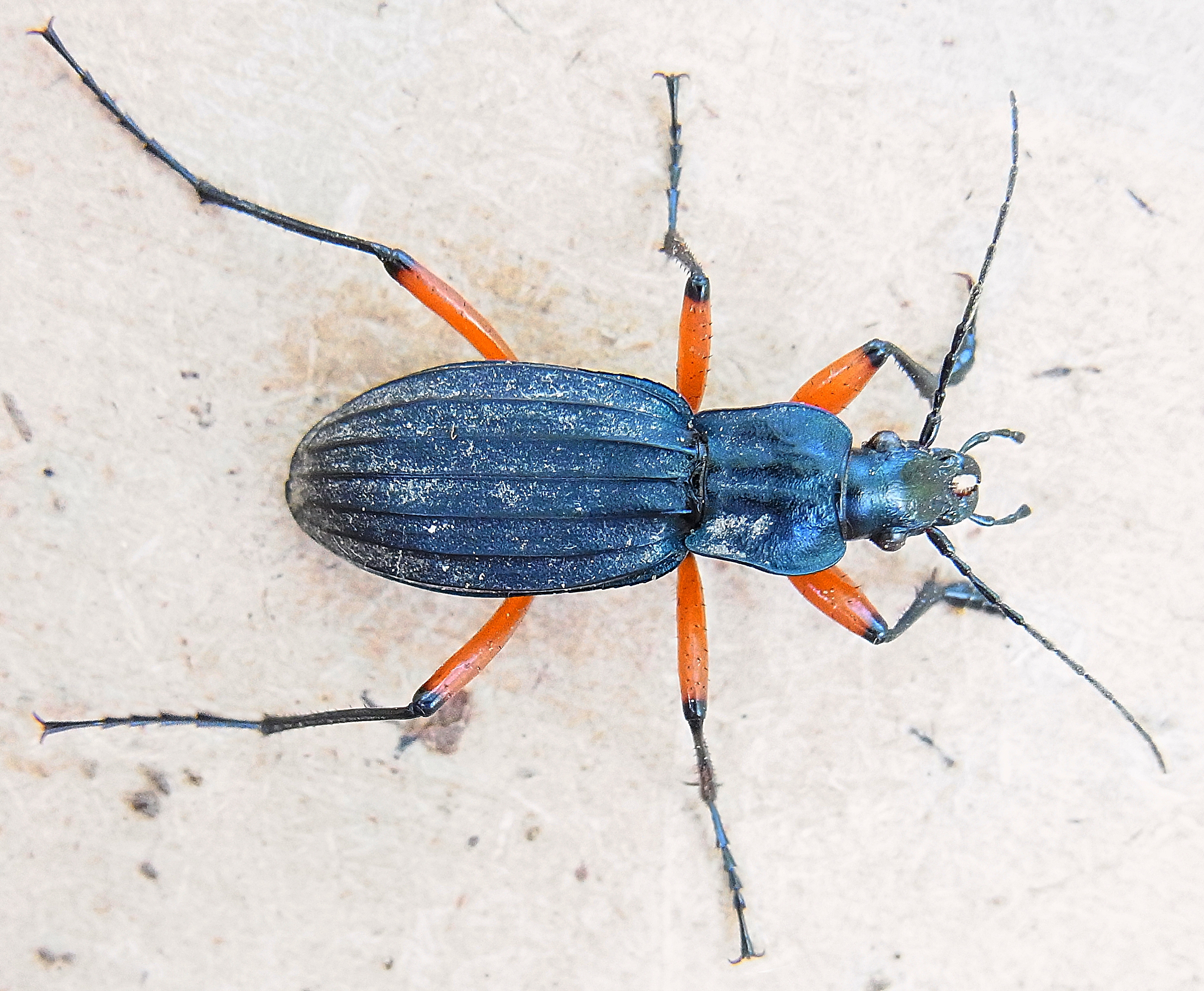 Carabus galicianus von Nordspanien, Gallizien, am Ufer des Fluß Navia bei Navia de Suarna, A Proba, Lugo am 23.Juli 2013